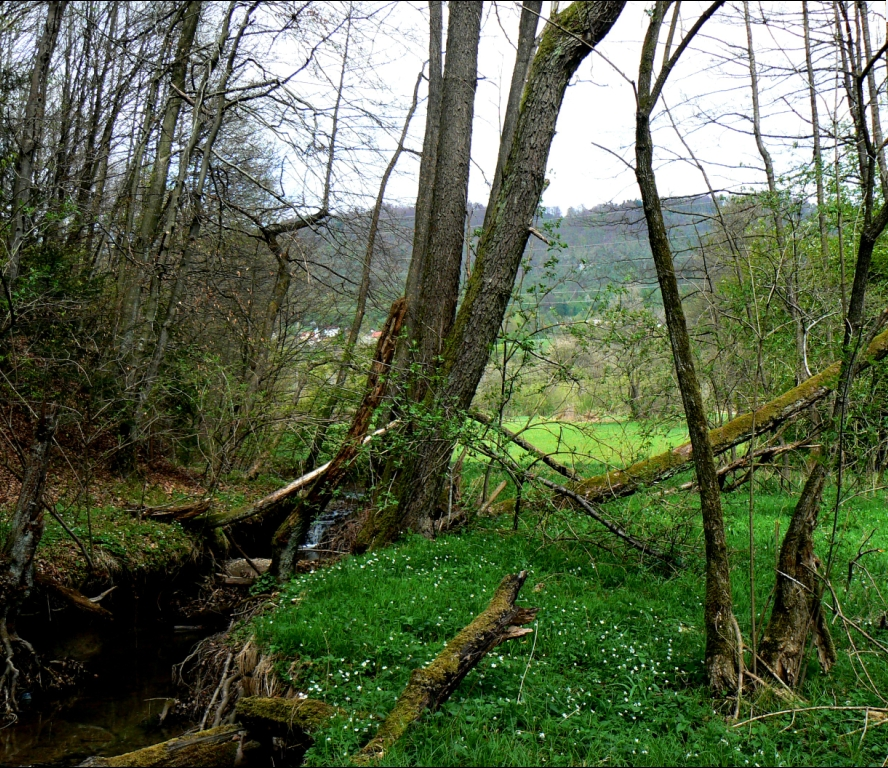 Jelševja ob Črnušnici